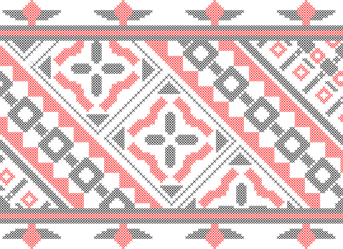 вишивка